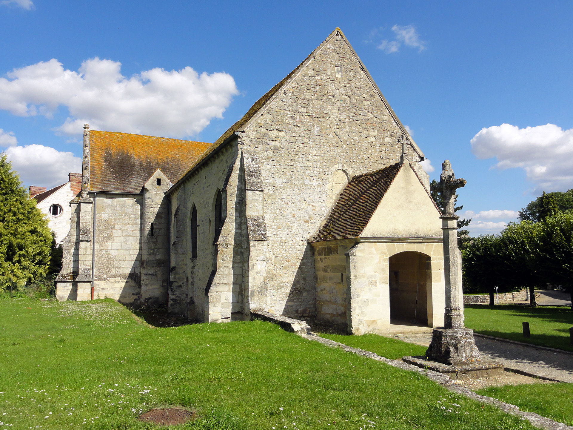 L'église Saint-Romain de Wy-dit-Joli-Village (Val-d'Oise), France.